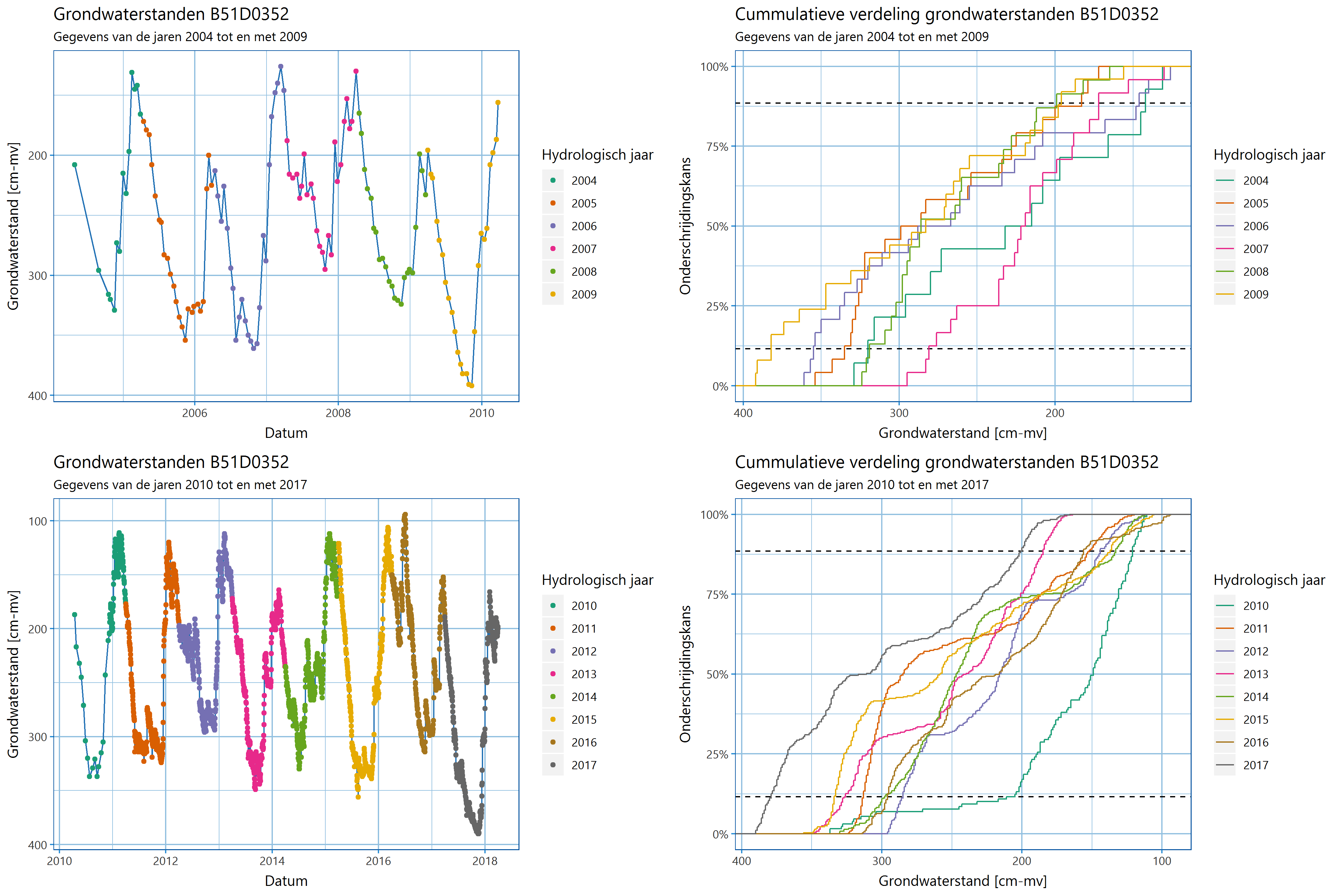 Grondwaterstanden in waarnemingsput B51D0352 nabij Wintelre, Noord Brabant